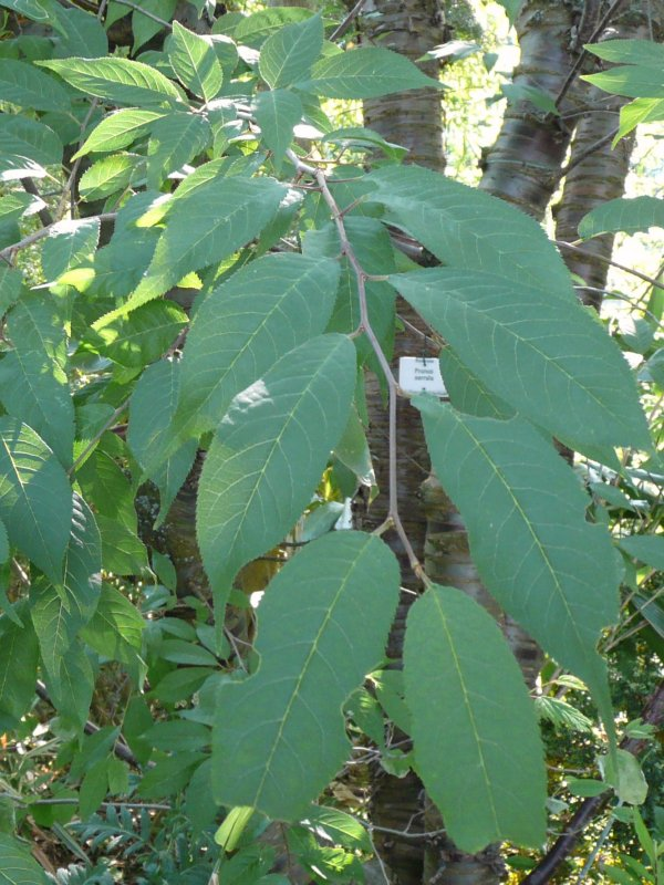 Botanischer Garten Erlangen, 2008